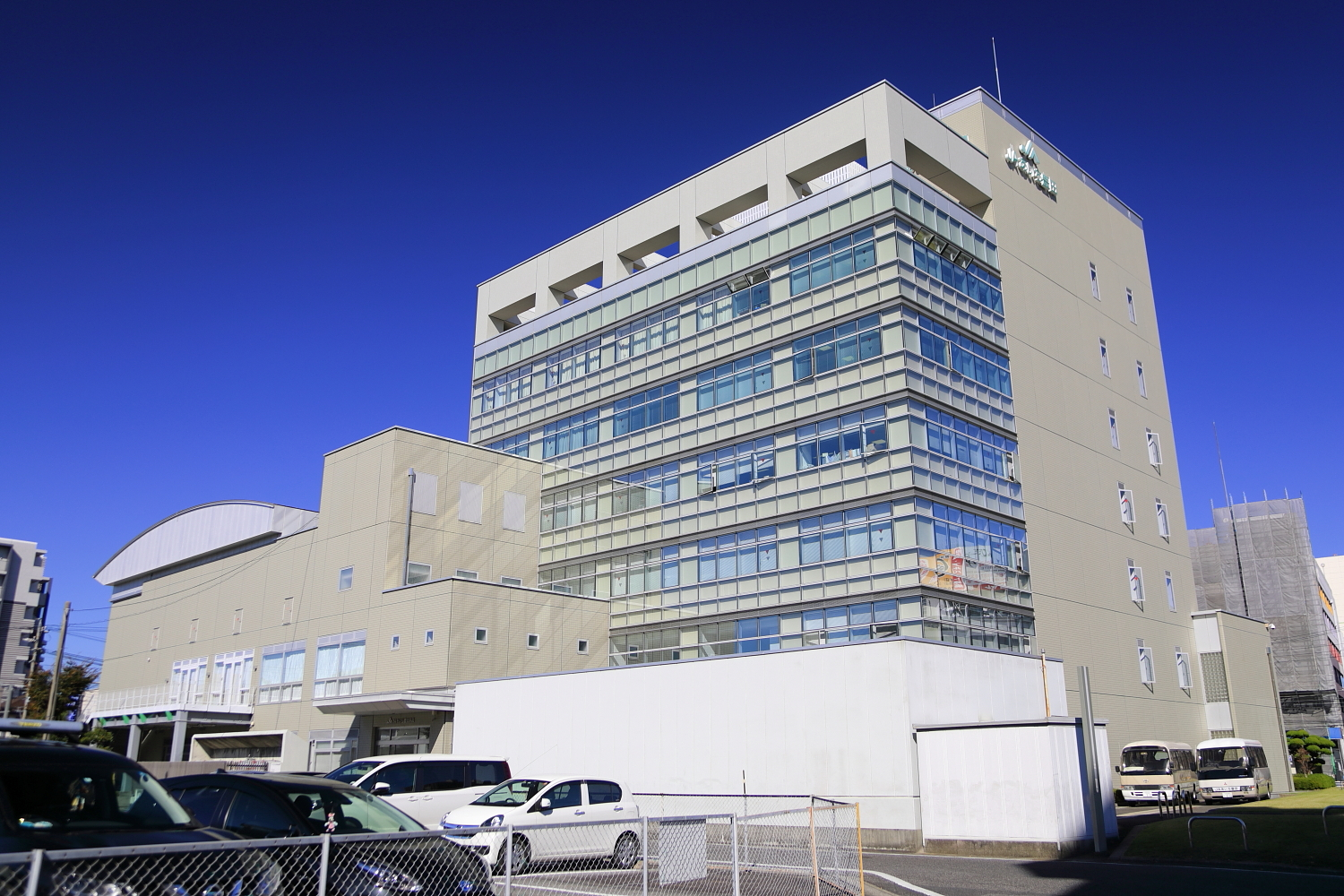 JAあいち豊田本店（2018年（平成30年）11月）